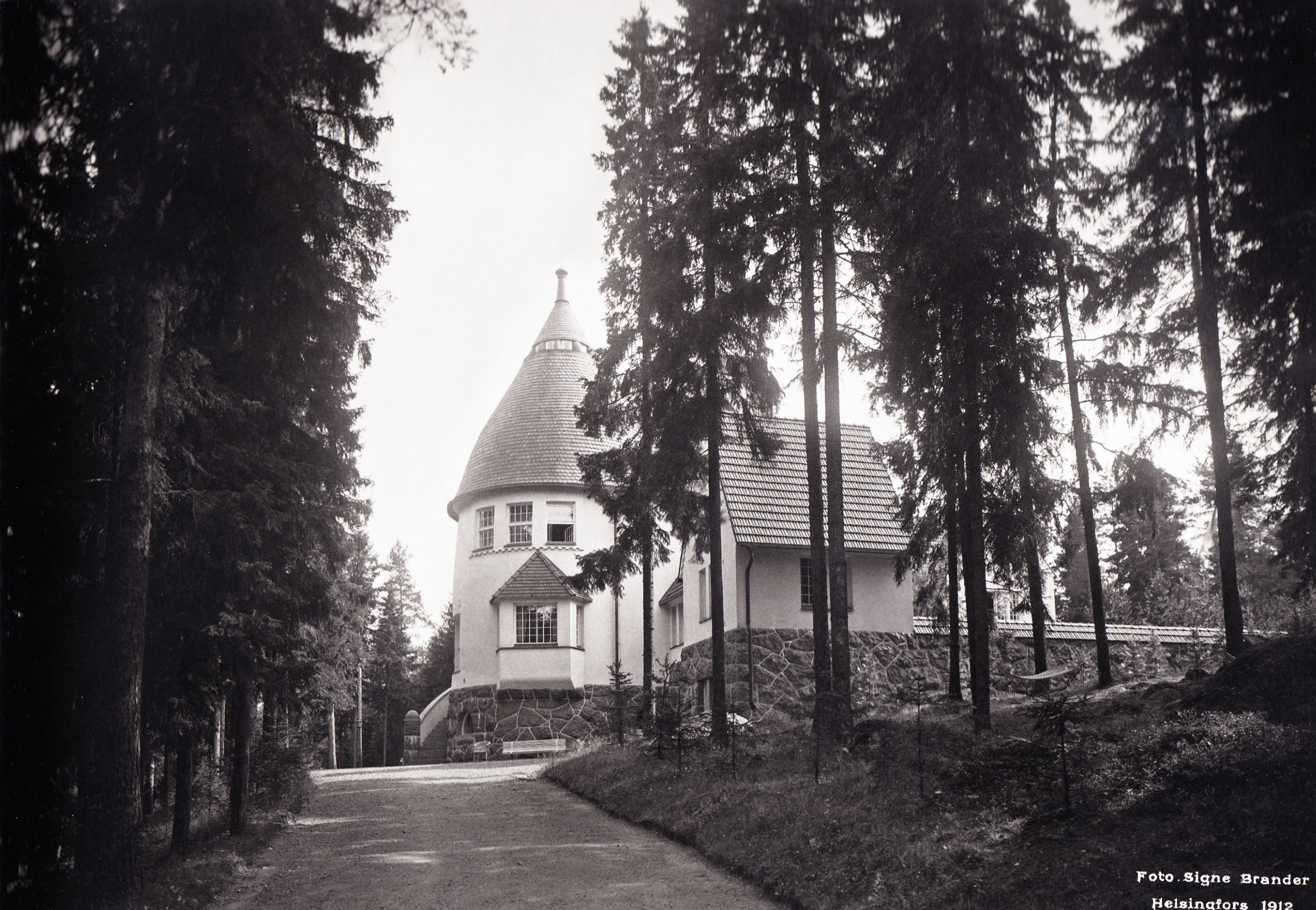 Suur-Merijoen kartano